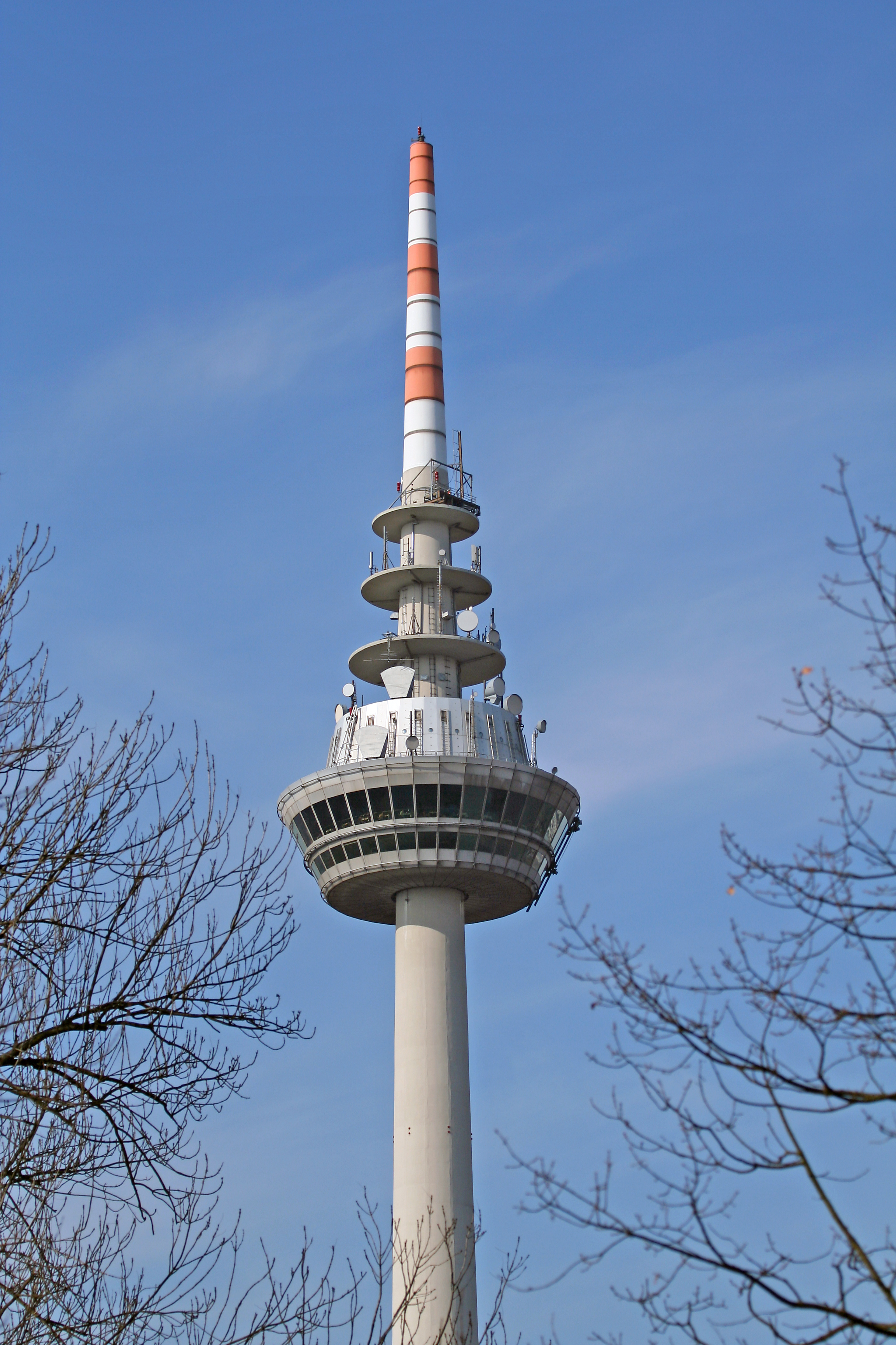 Spitze des Fernmeldeturms Mannheim: Drehrestaurant und Antennenplattformen.